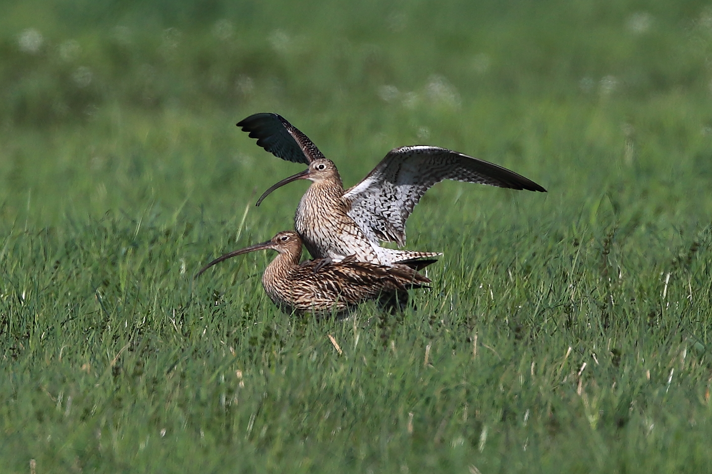 Paarung des Großen Brachvogel